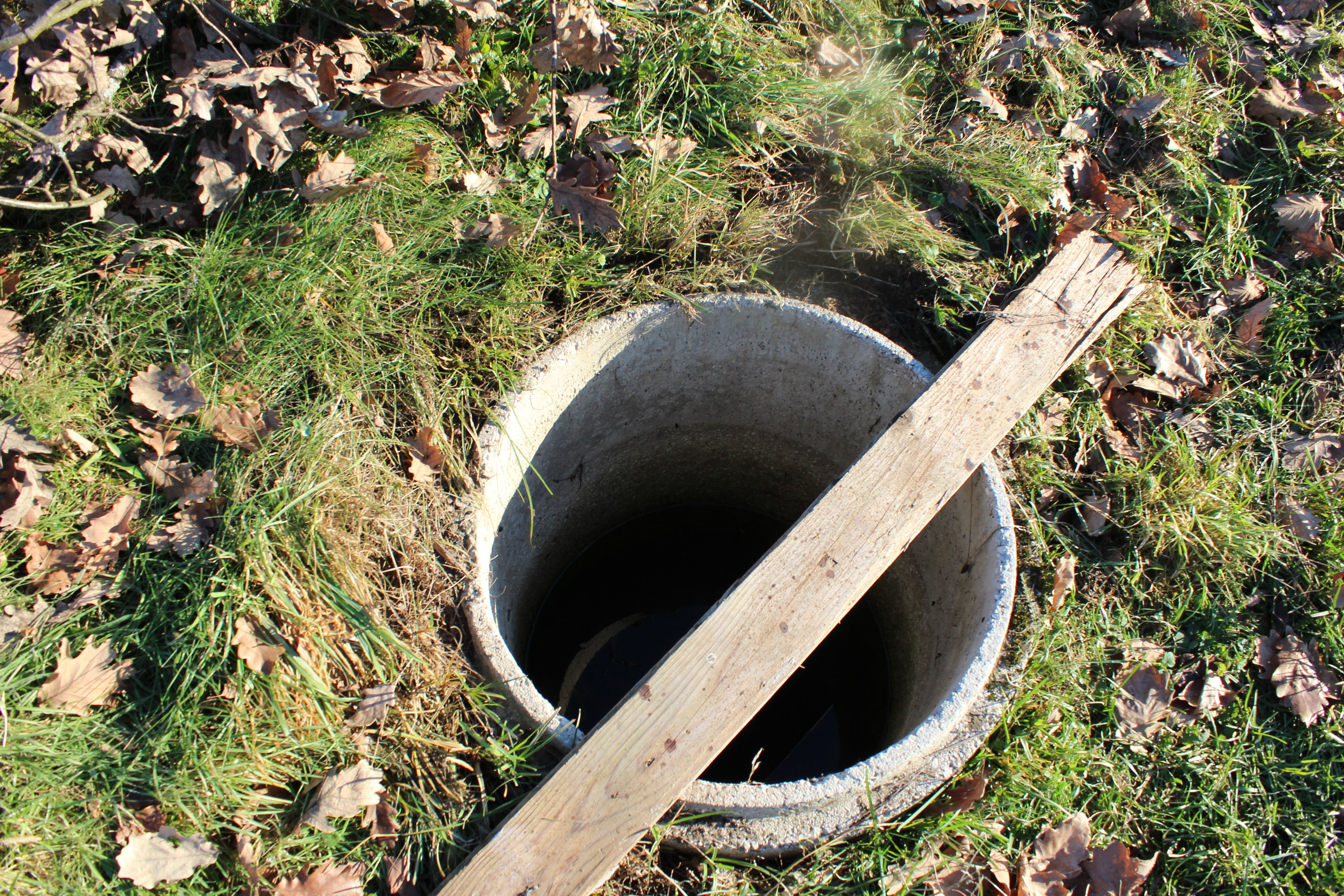 Izvor vode kod alijinog turbeta u Trnovi kod Sanskog Mosta.